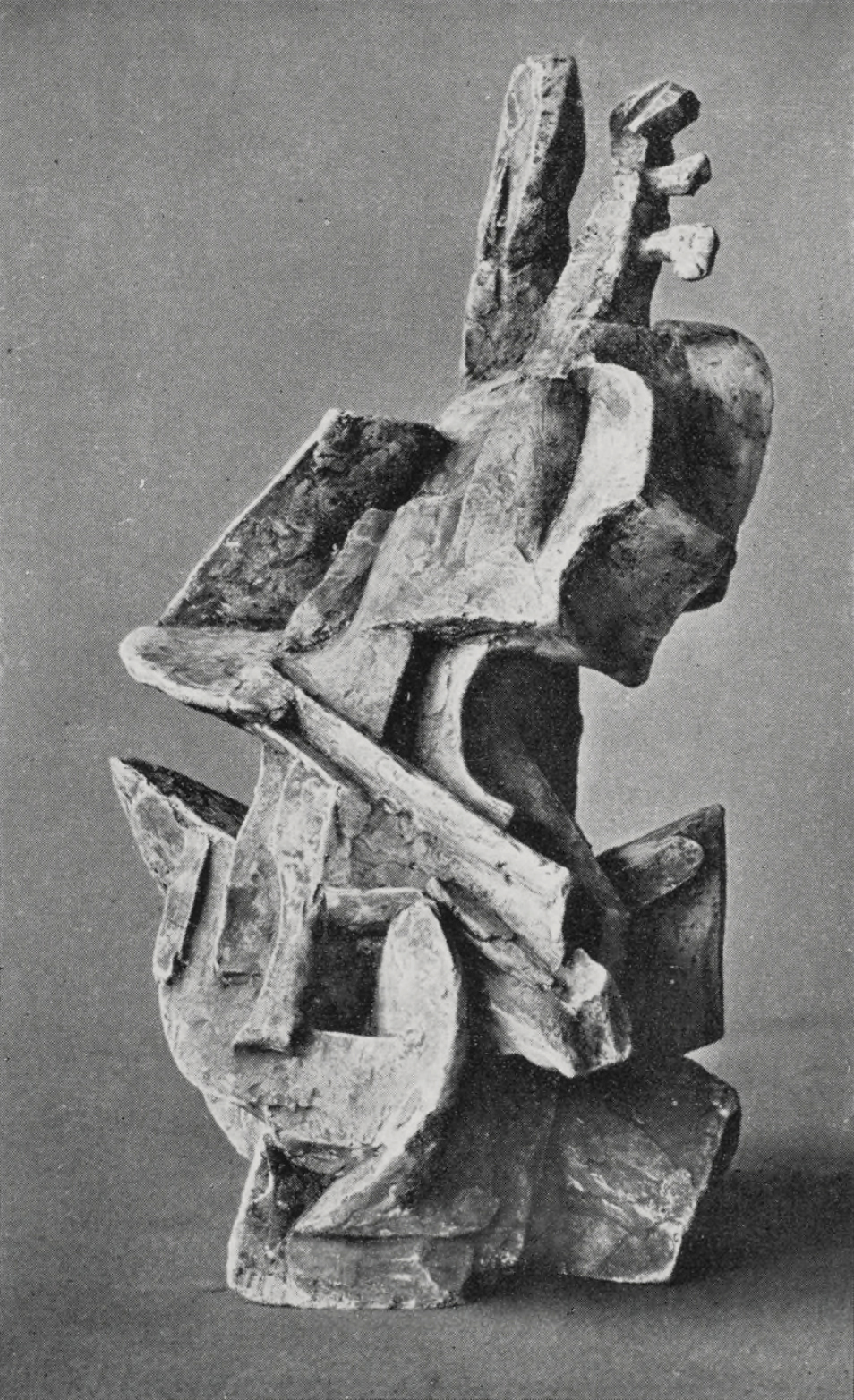 Violoncelliste